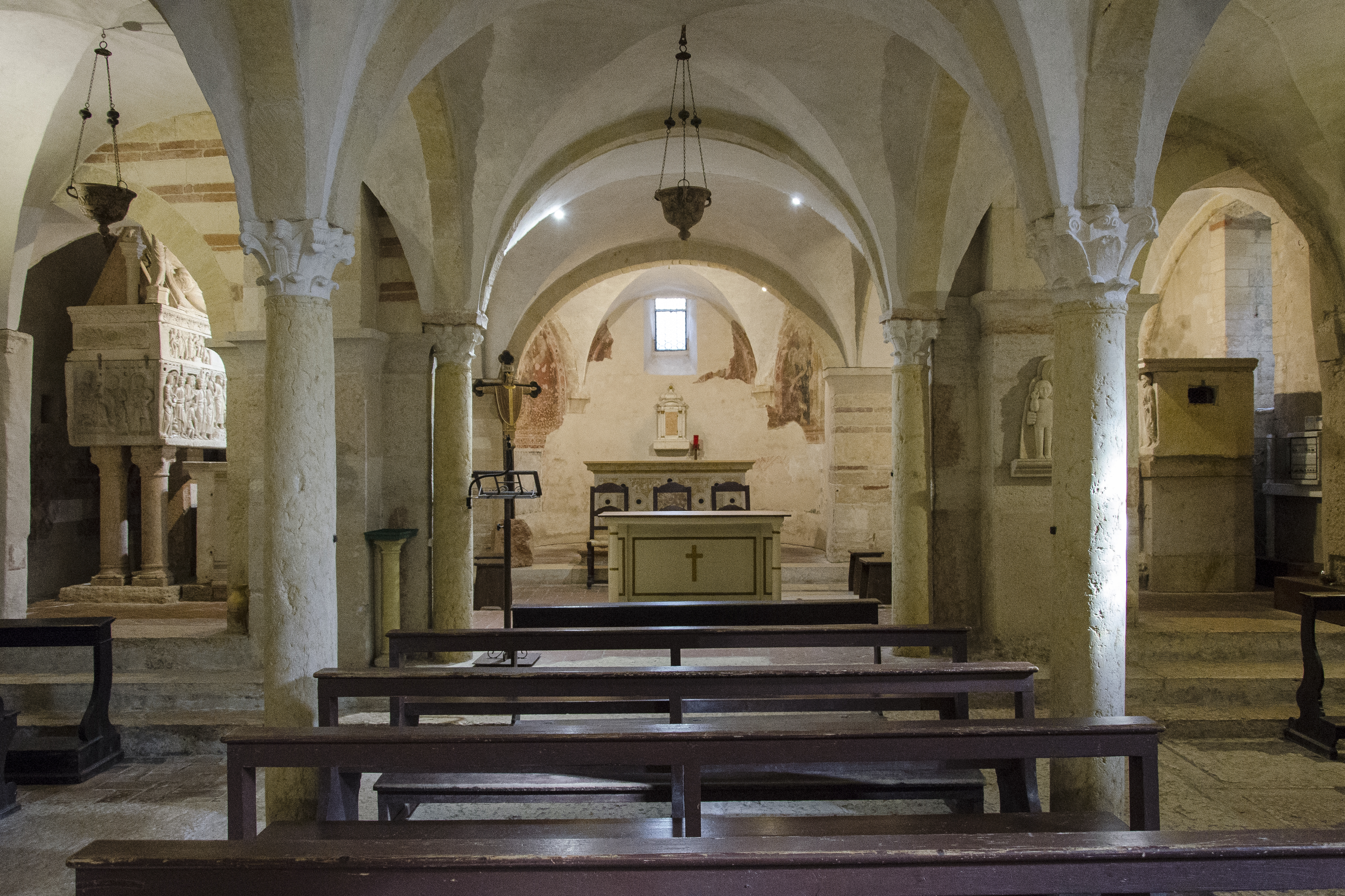 Veduta verso l'altare